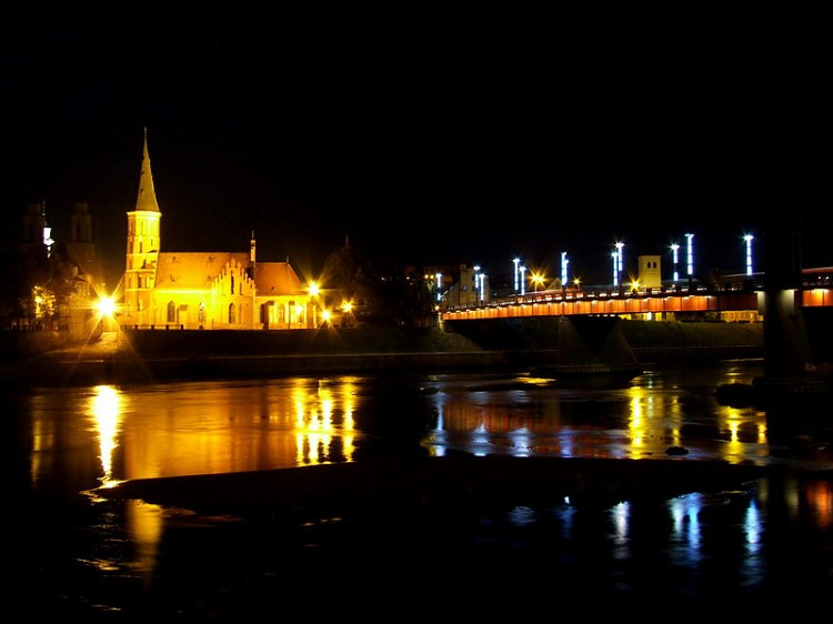 Kaunas